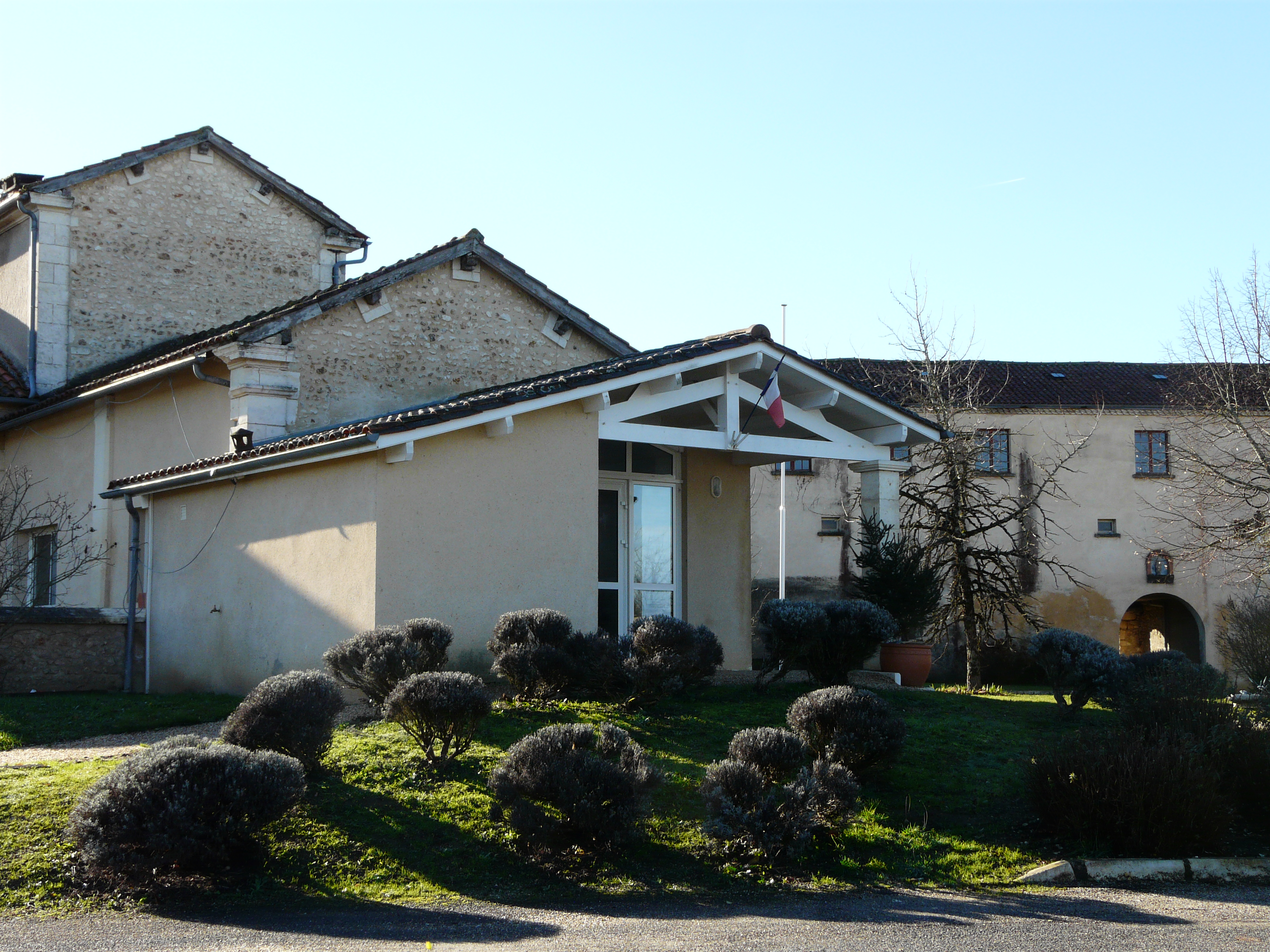 La mairie de Bourrou, Dordogne, France.